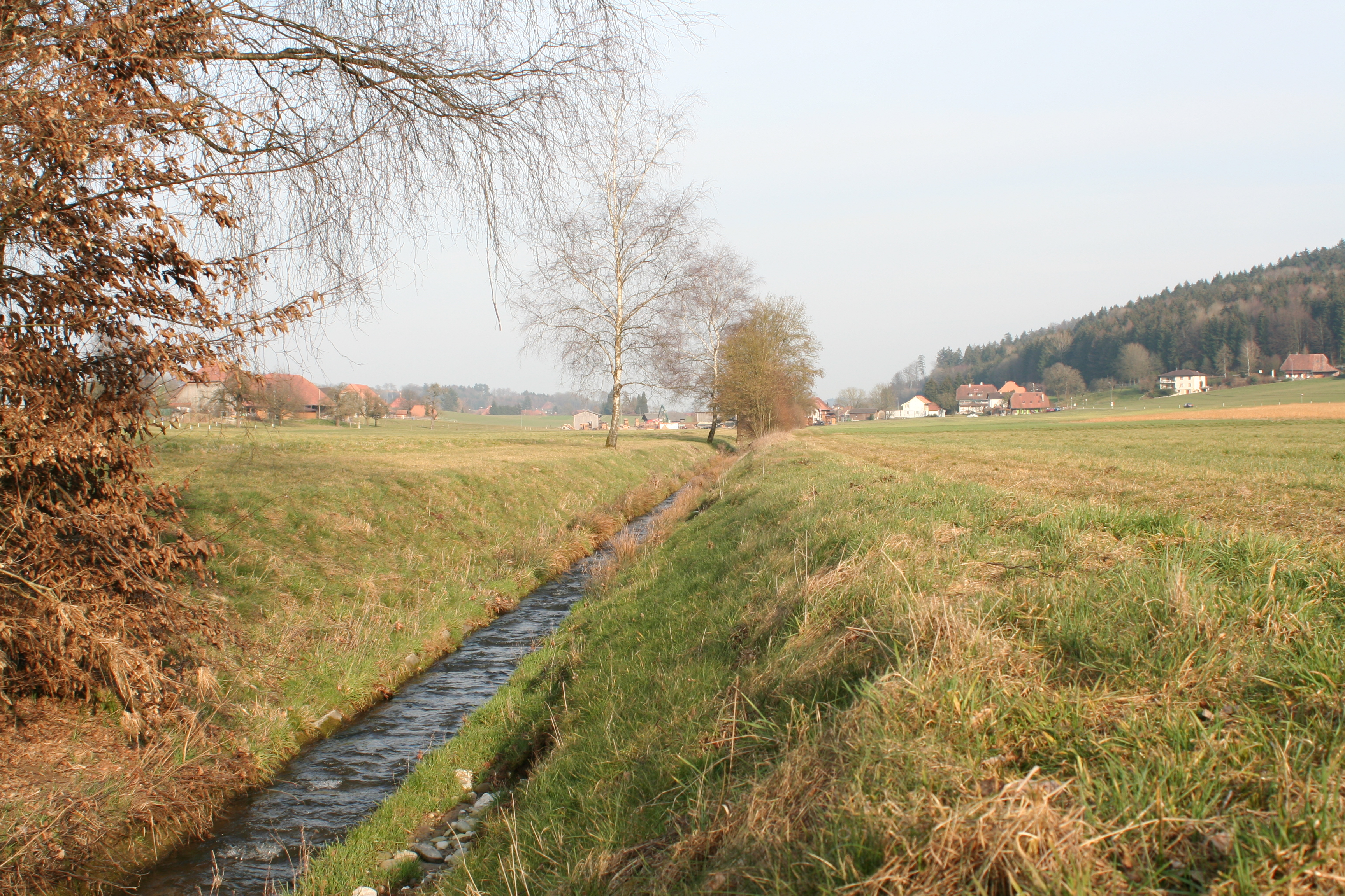 Biberenbach oberhalb von Lüterkofen-Ichertswil